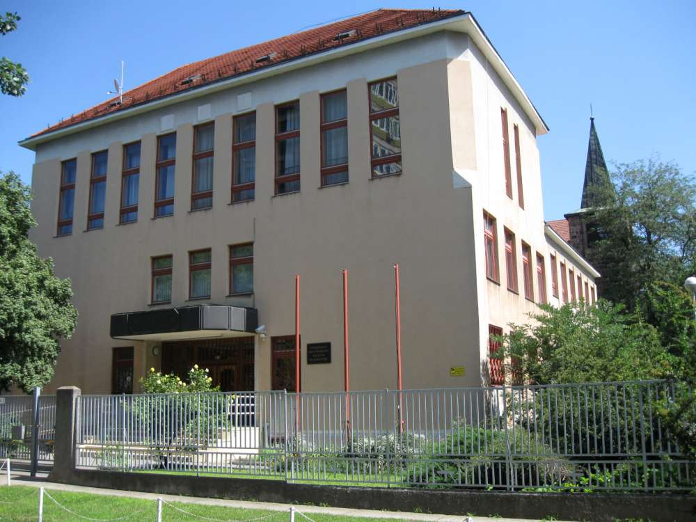 Evangélikus Hittudományi Egyetem (Magyarország, Budapest, XIV._kerület, Rózsavölgyi köz 3.)